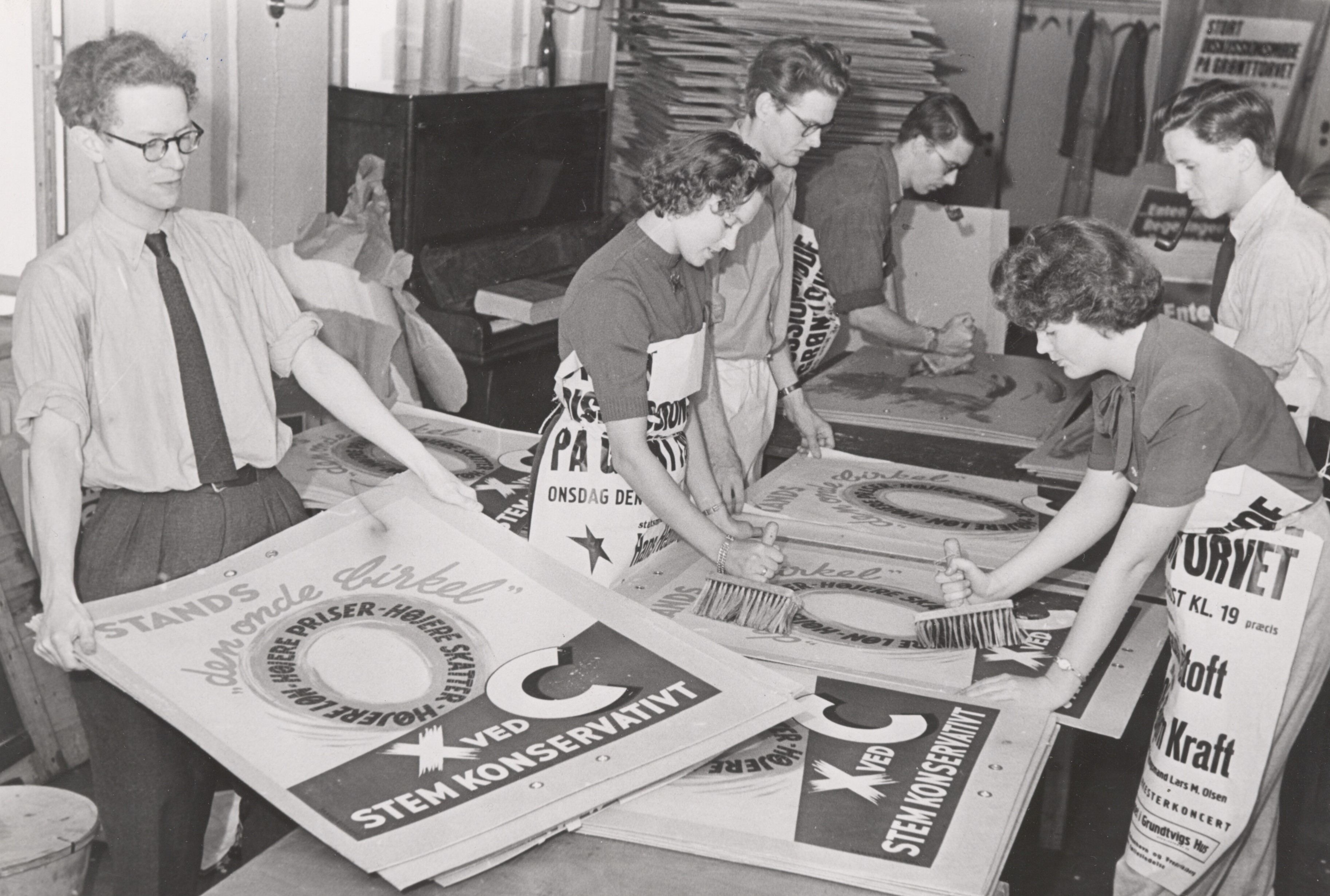 Konservative valgplakater forberedes